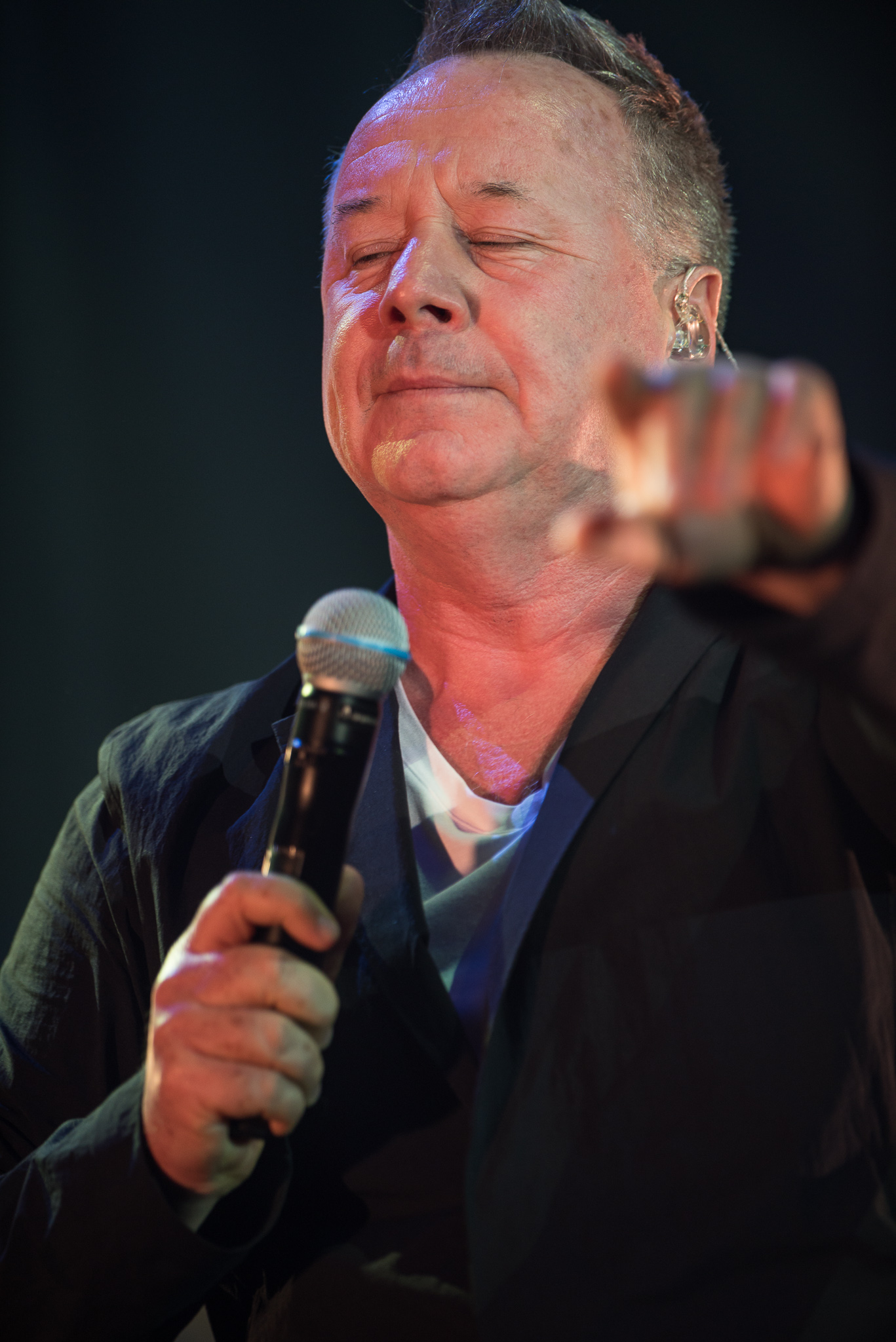 Acoustic Live Tour,Concertbüro Franken,Jim Kerr,Konzert,Livekonzert,Livemusik,Meistersingerhalle,Simple Minds